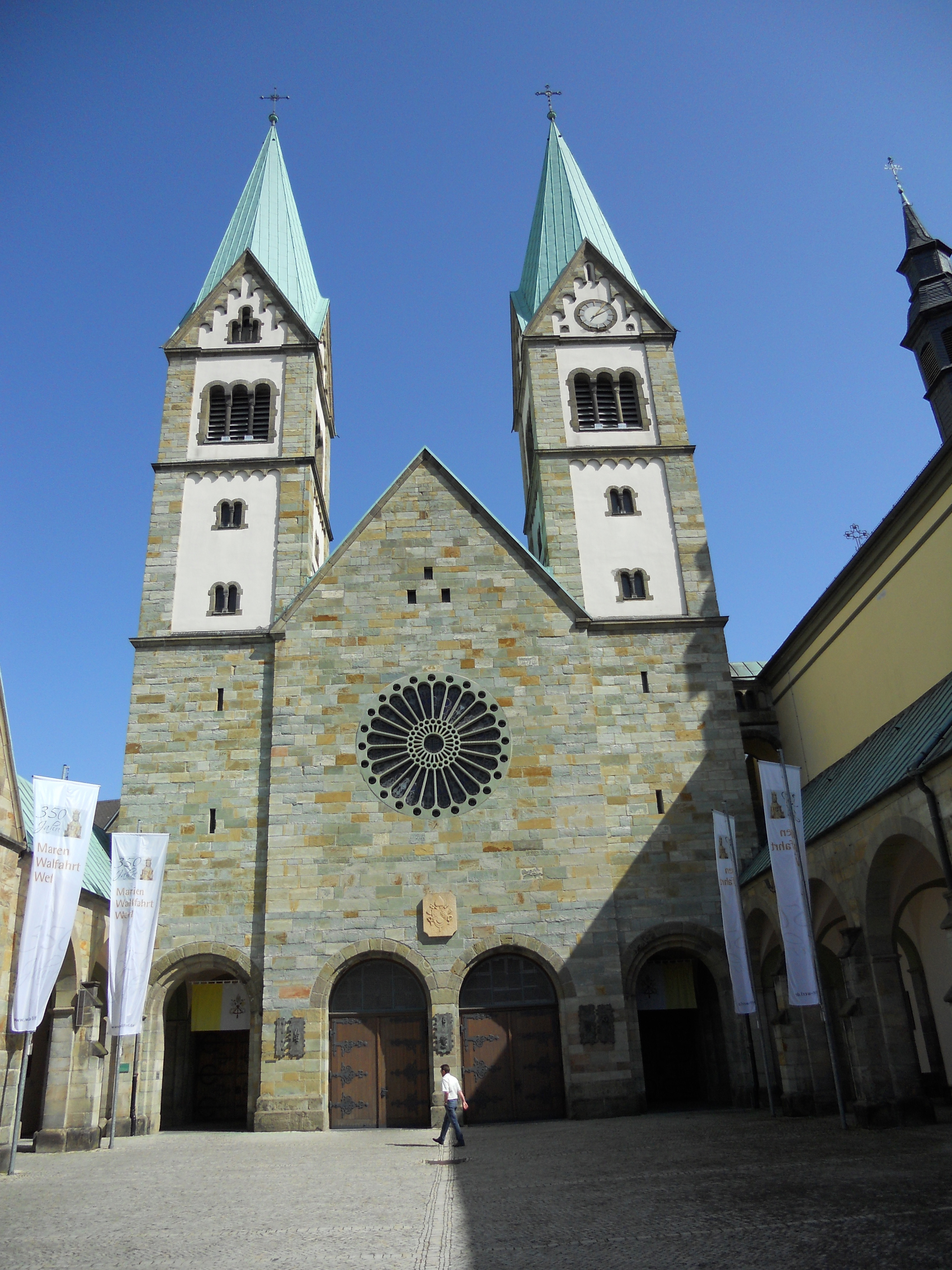 Ansicht der Basilika mit dem Wappen des aktuellen Papstes Benedikt XVI